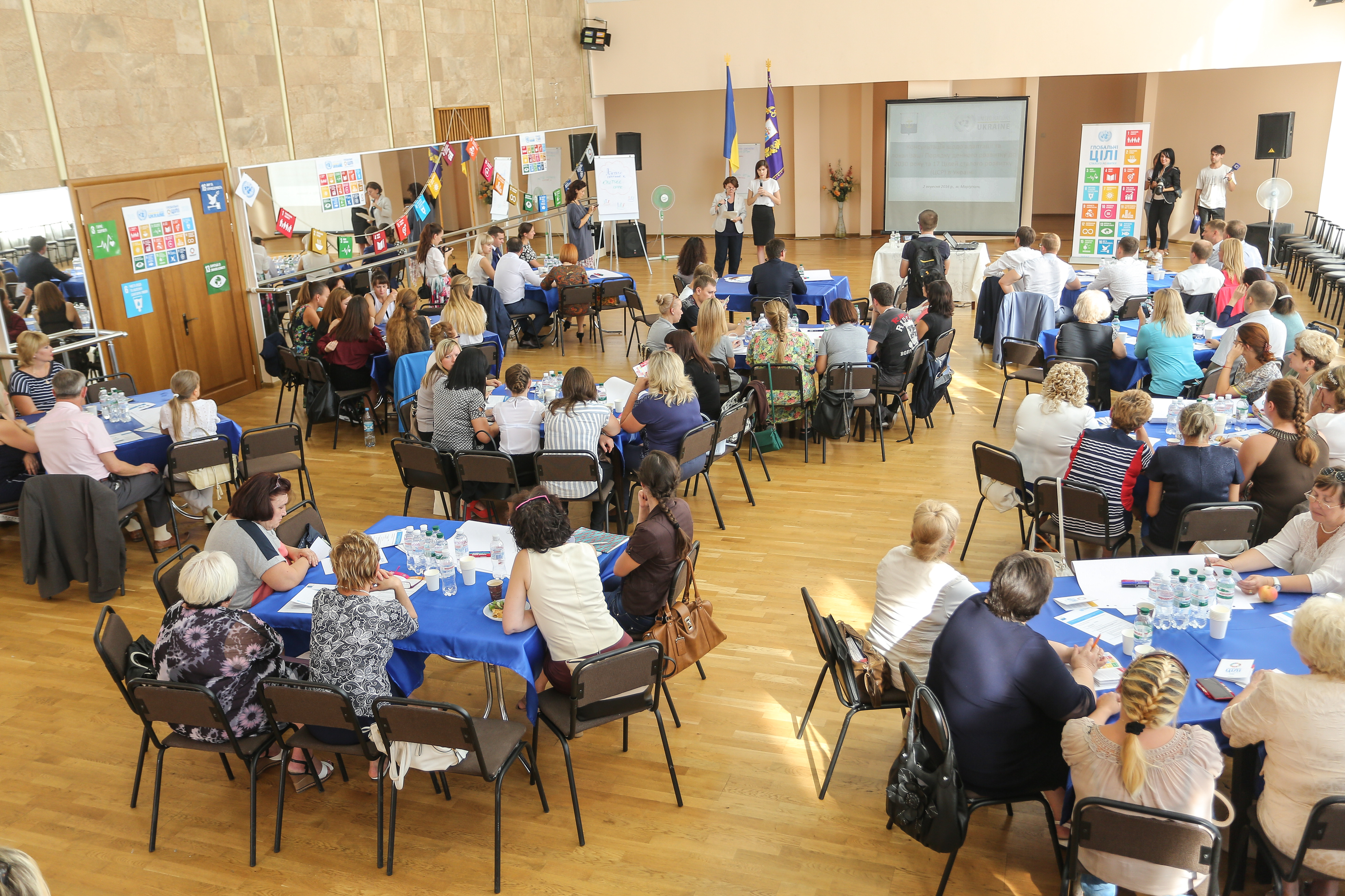 (c) UNICEF/Alexei Kozlov